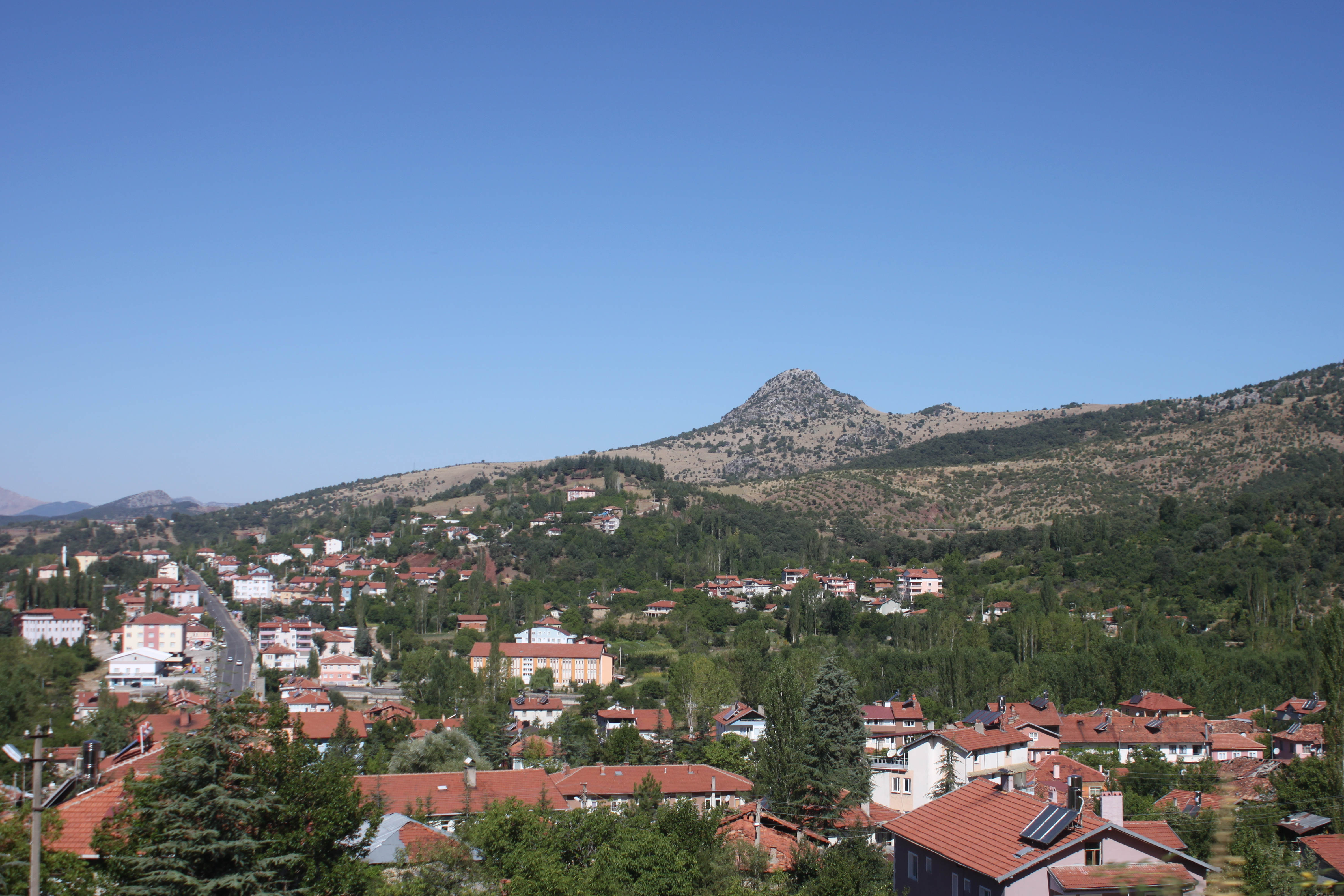 Blick auf die Kreisstadt Aksu in der Provinz Isparta, Türkei